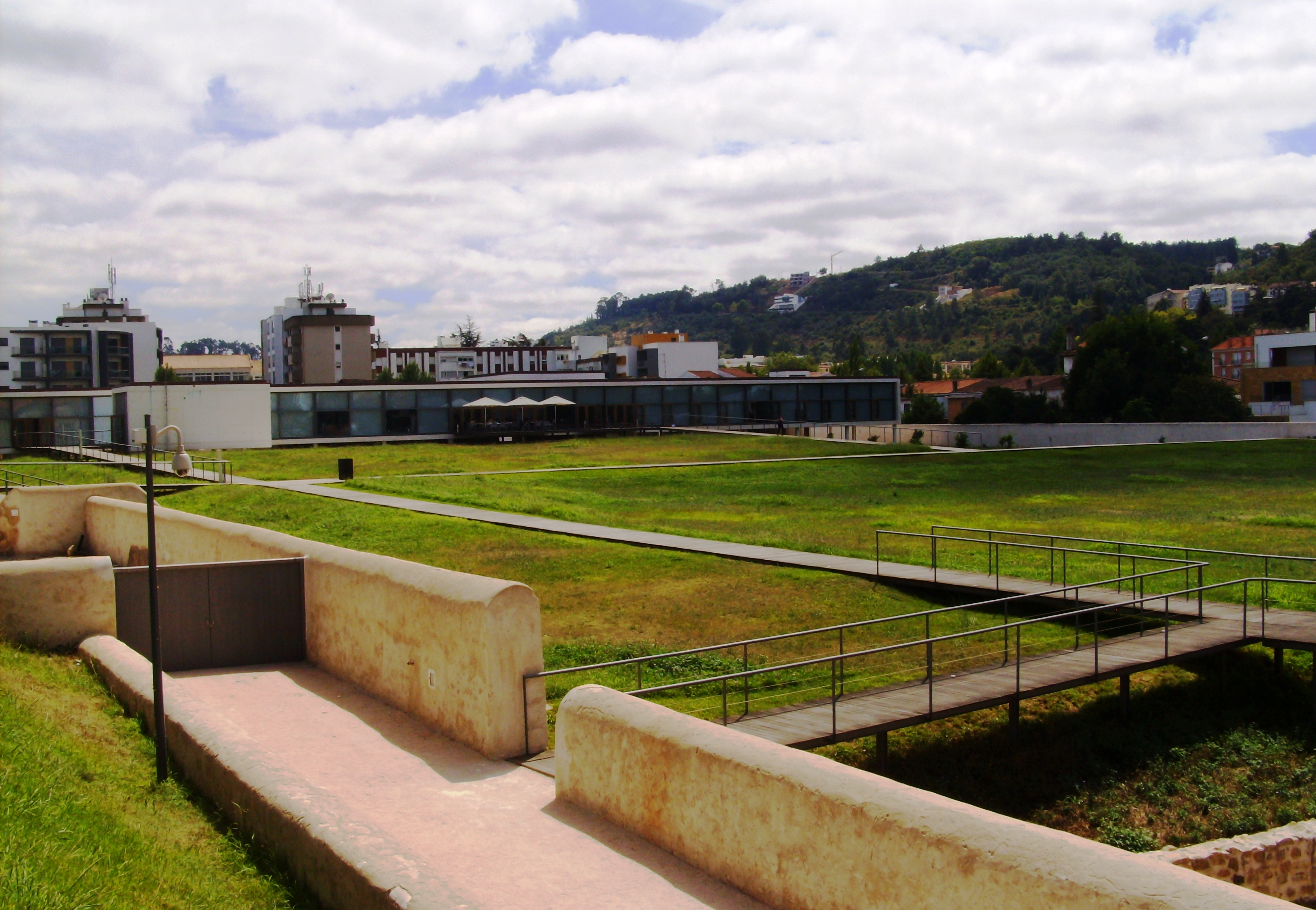 Mosteiro de Santa Clara-a-Velha, Coimbra, Distrito de Coimbra, Portugal: Centro de Interpretação.